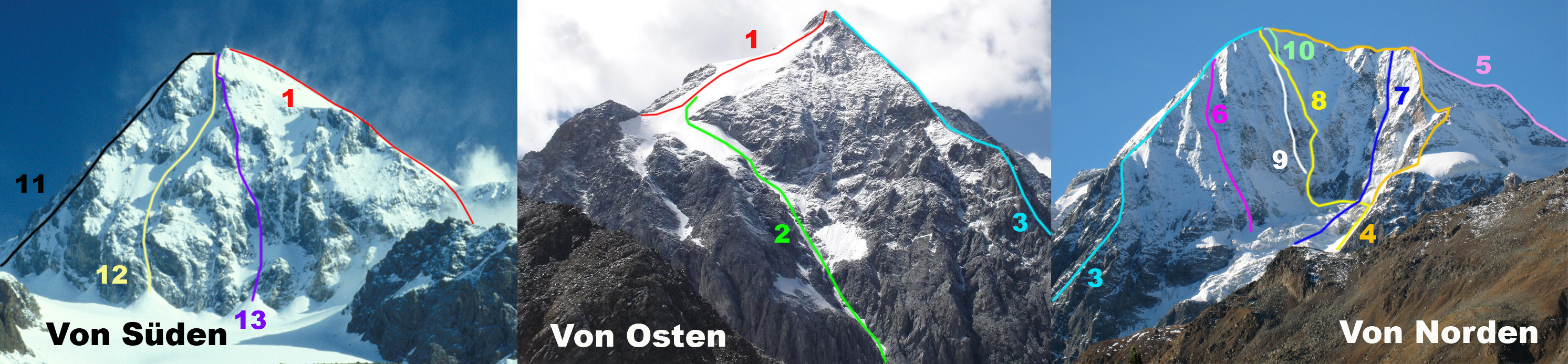 Gran Zebrù - Koenig Spitze dalla Val Cedech, Italia Die Königspitze (3851m), (c) Simon Schranz